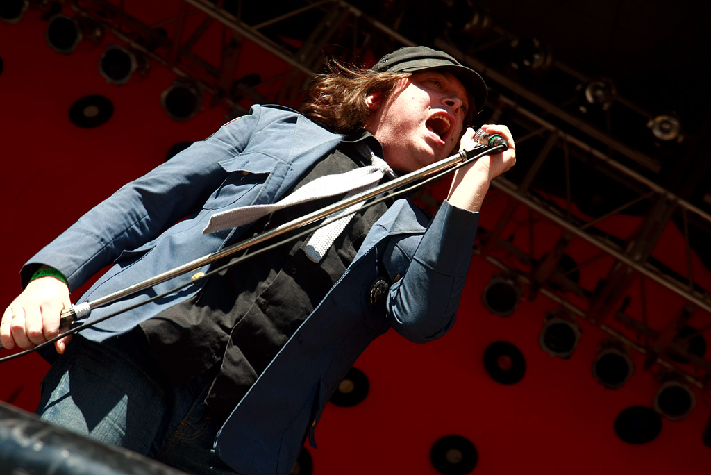 Beto Bruno, vocalista da banda Cachorro Grande em concerto na cidade de São Paulo, 2008.